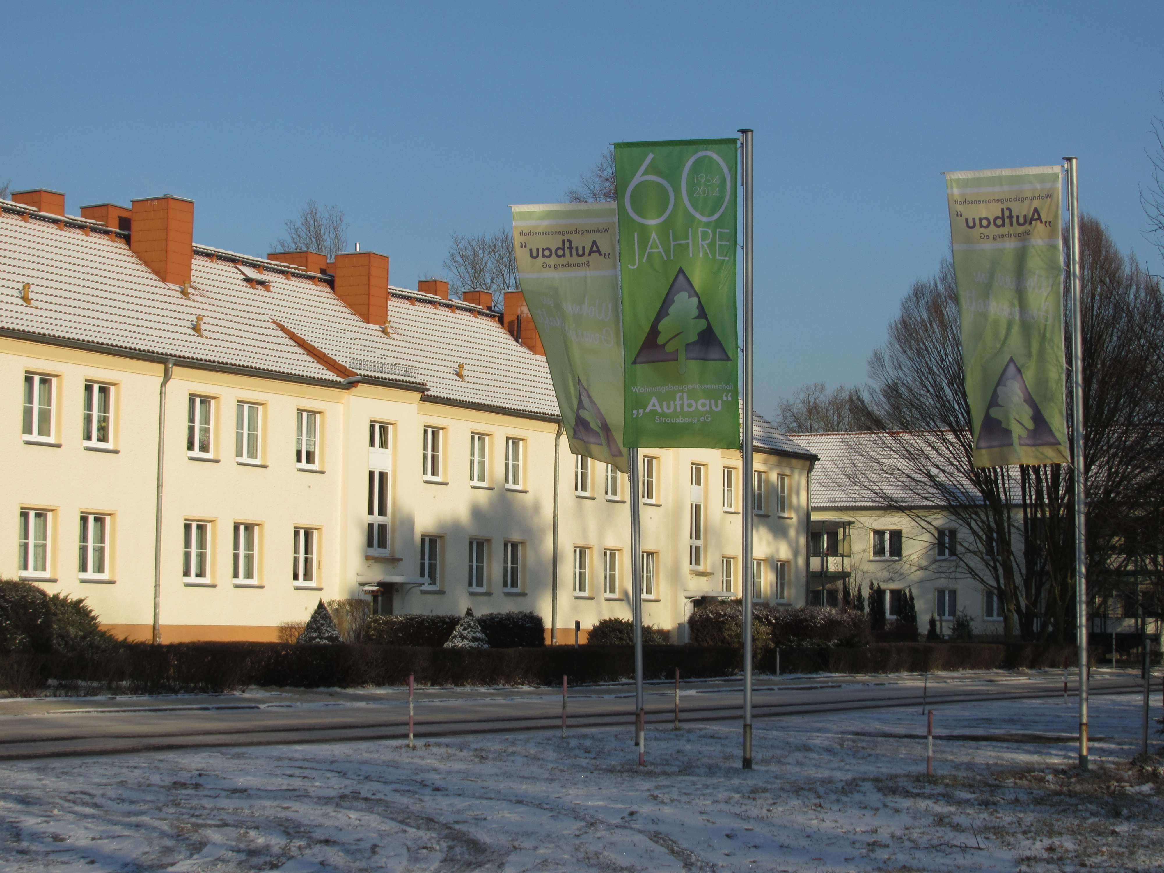 Gustav-Kurtze-Wohnpark Wohnungsbaugenossenschaft (WBG) Aufbau eG Strausberg - Haus aus den 50er Jahren in Strausberg Vorstadt